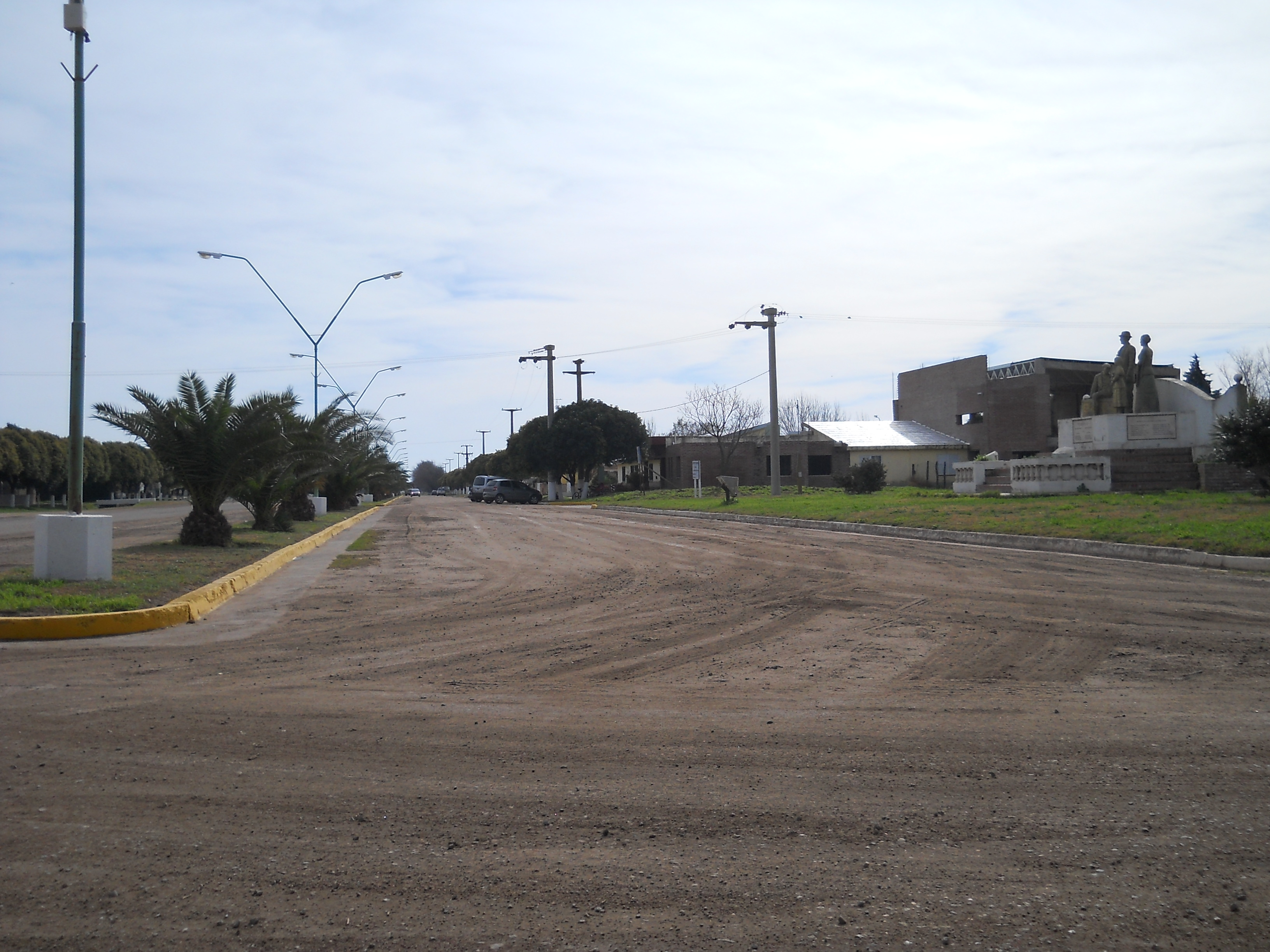 Calchín Oeste